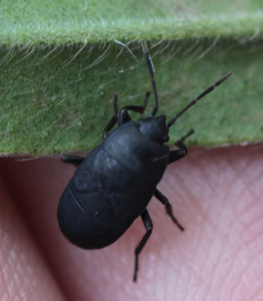 Nymphe von Aellopus atratus am 24.8.2017 in der Schwetzinger Hardt